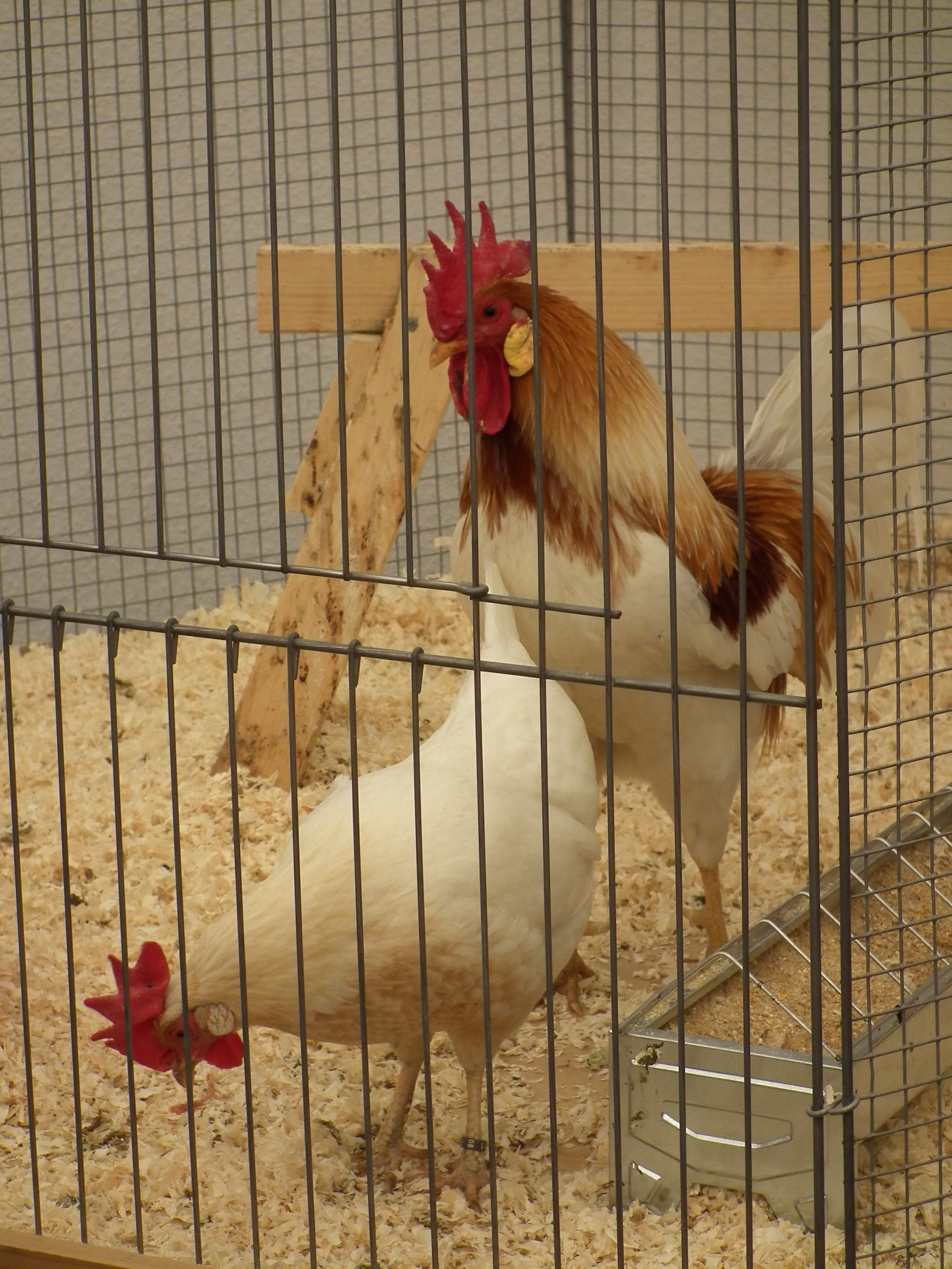 Goldfarbige Zwerg-Italiener, Hahn und Henne